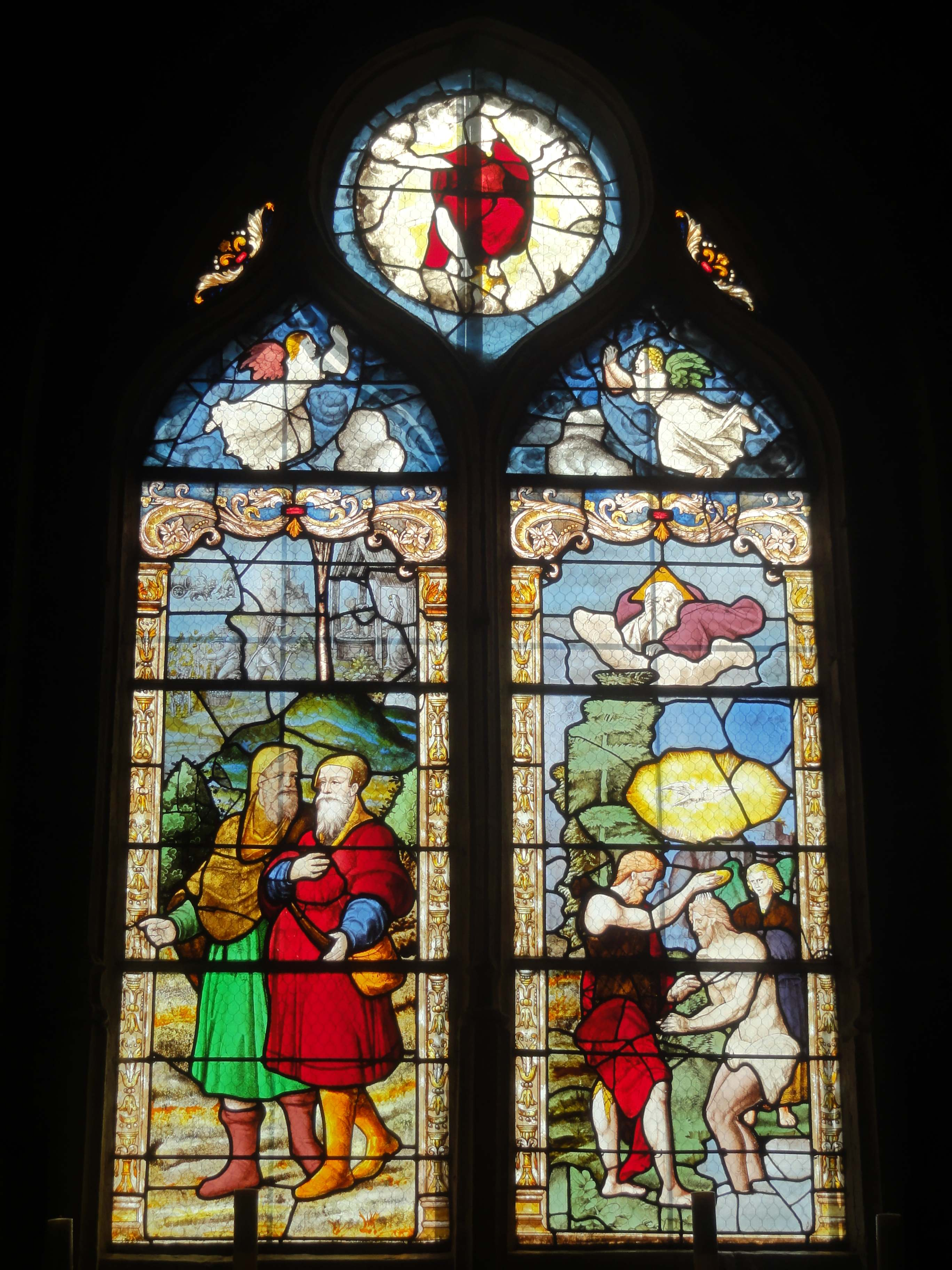 Collatéral sud, verrière n° 2 : les pèlerins d'Emmaüs, le baptême du Christ.